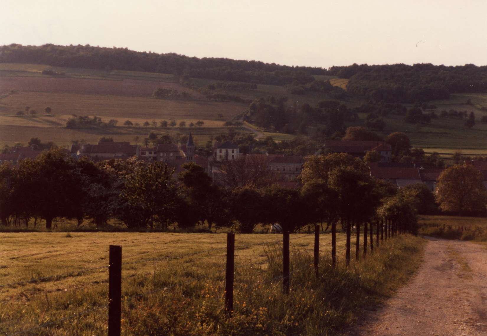 Le village de Dannevoux vu depuis la côte.